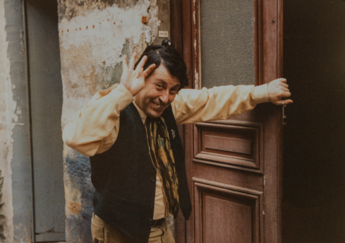 Davant la seva casa de París